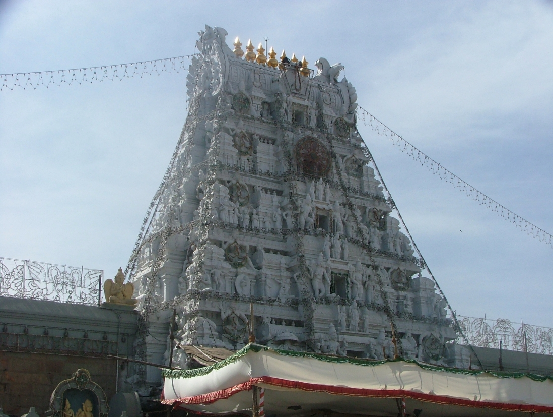 Gopuram of Tirumala Venkateswara Temple